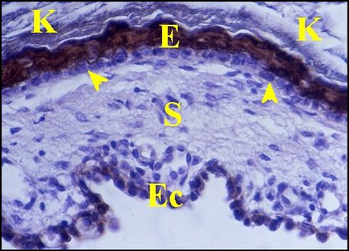 Epithéliums malpighien et de caisse dans un cholestéatome. Soulignés par la mise en évidence des cytokératines.